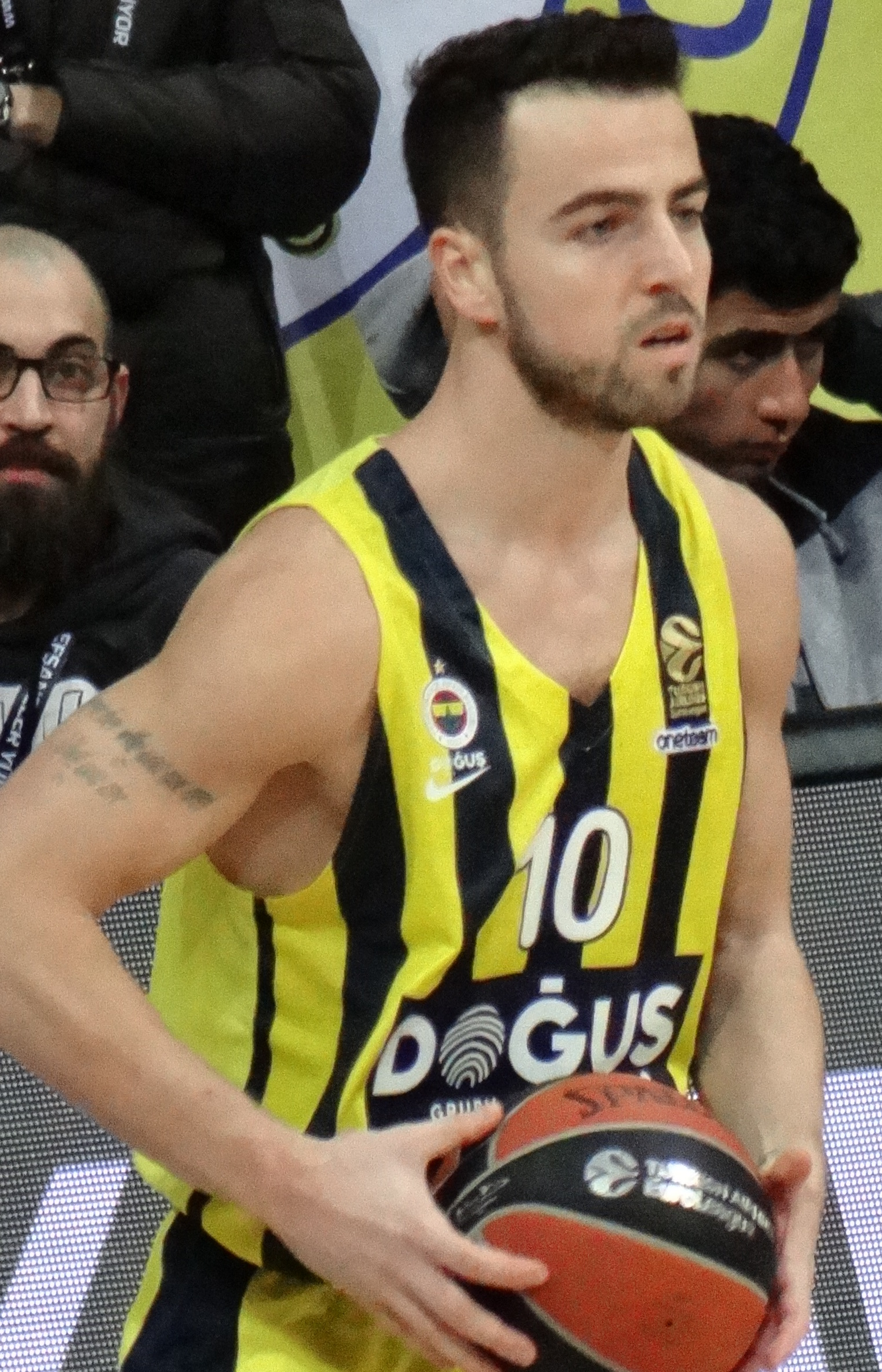 Melih Mahmutoğlu 10 - FB Dogus 20171219